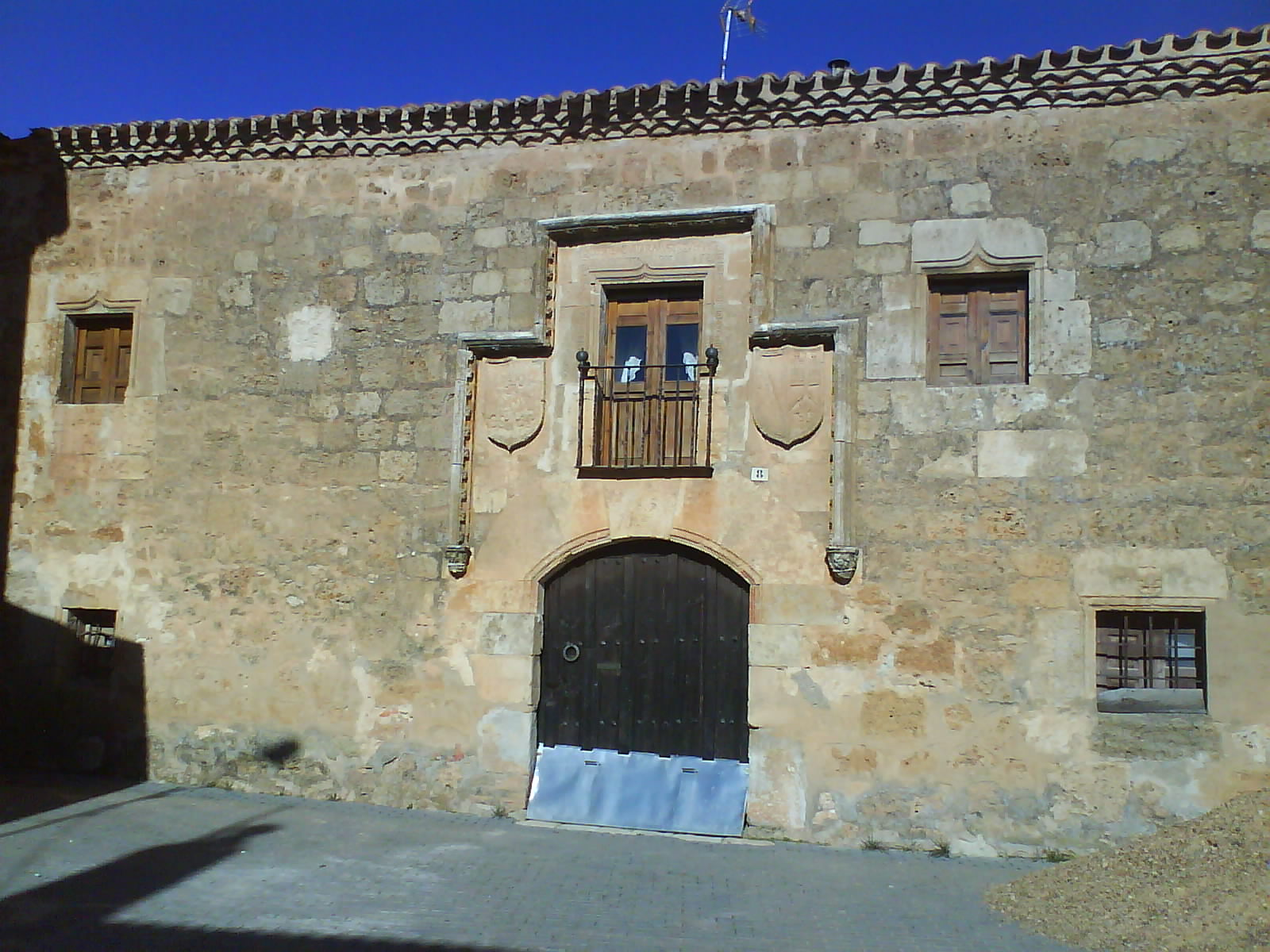 Palacio de Fuente Pinilla